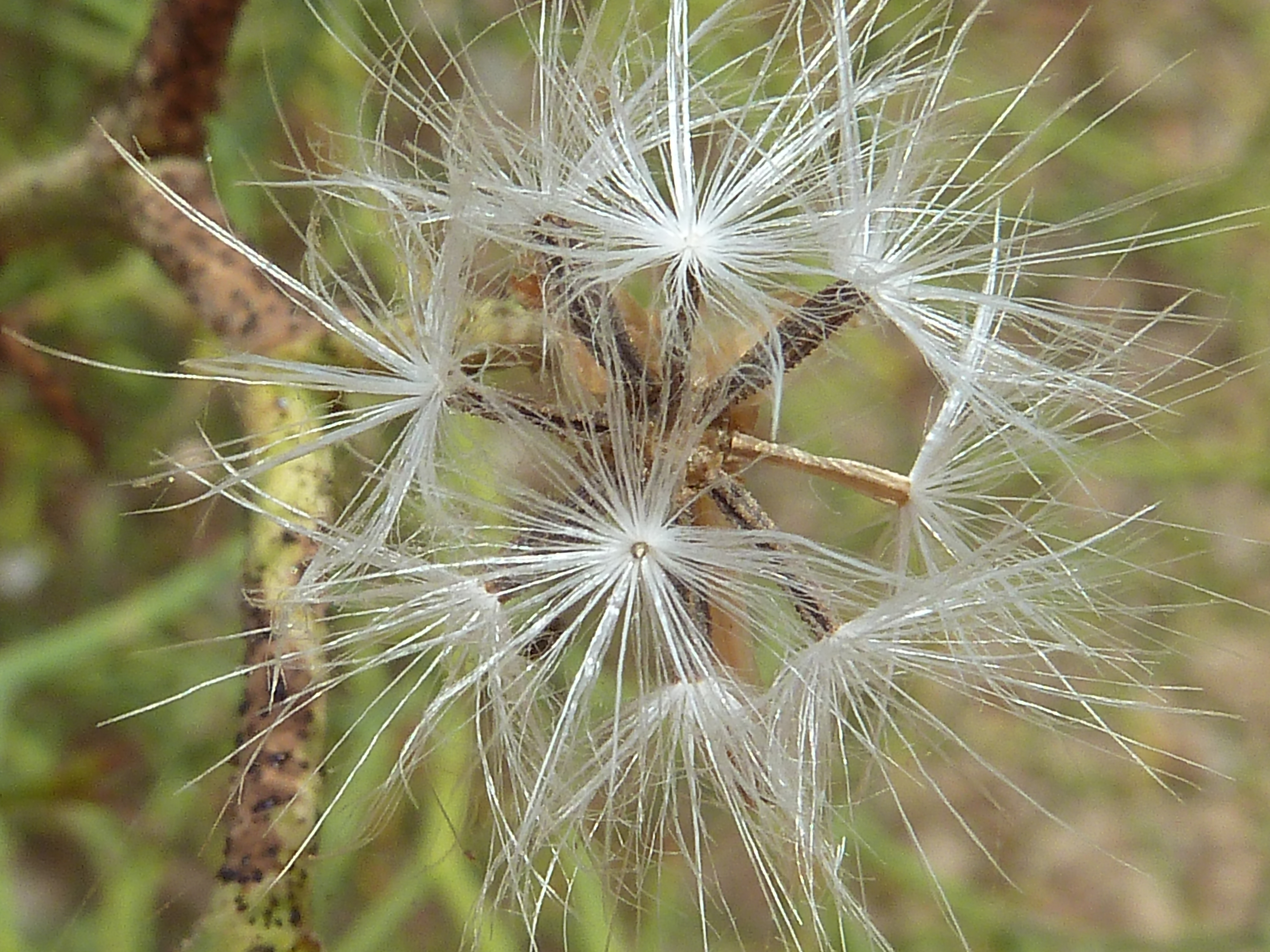 Launaea arborescens (Aulaga morisca) - Cipselas con vilanos dimórficos in situ; vista cenital. - Descampado circa Circumvalación Norte, Águilas (Provincia de Murcia, España).